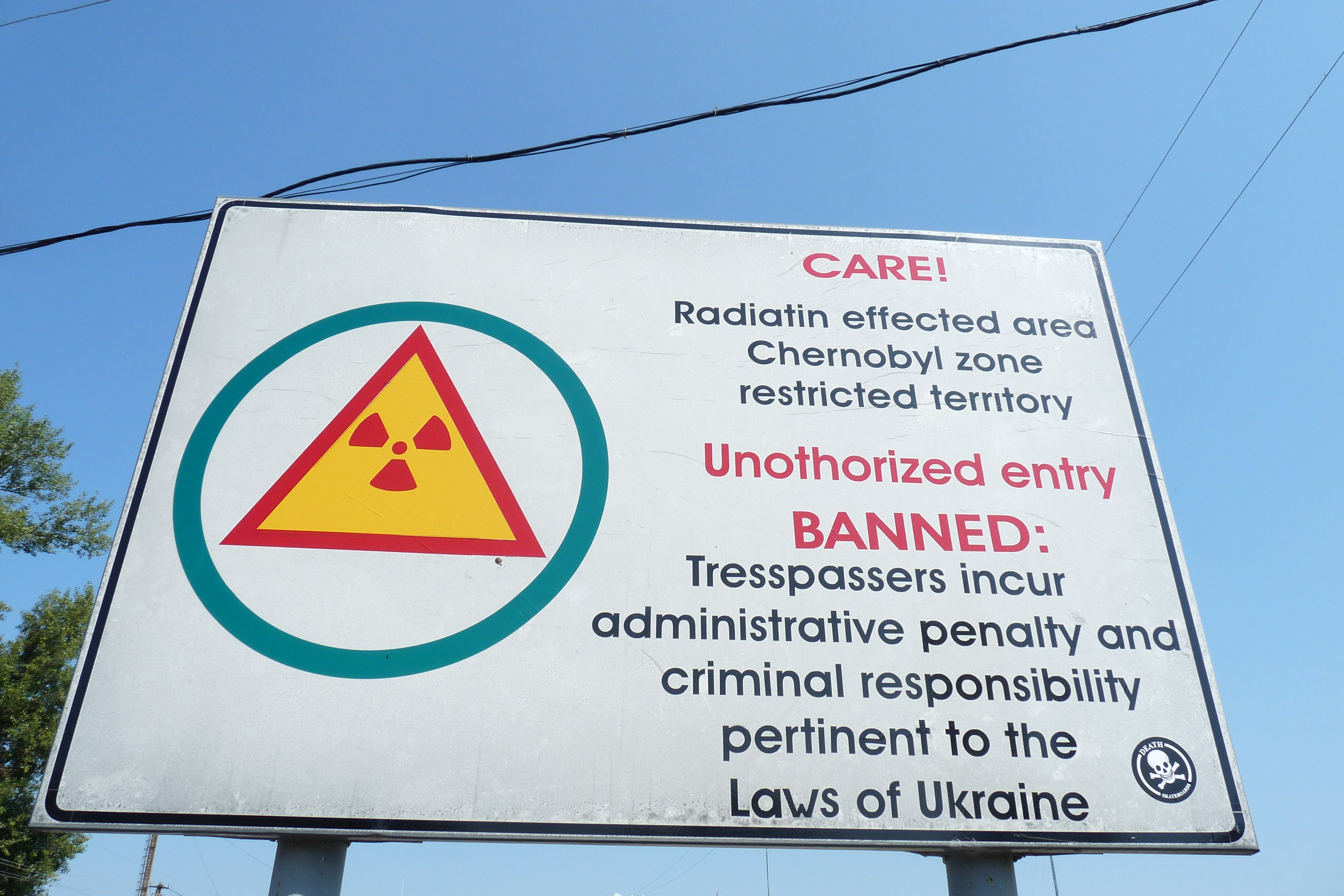 Chernobyl